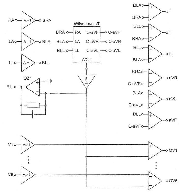 Vstupní část EKG přístroje